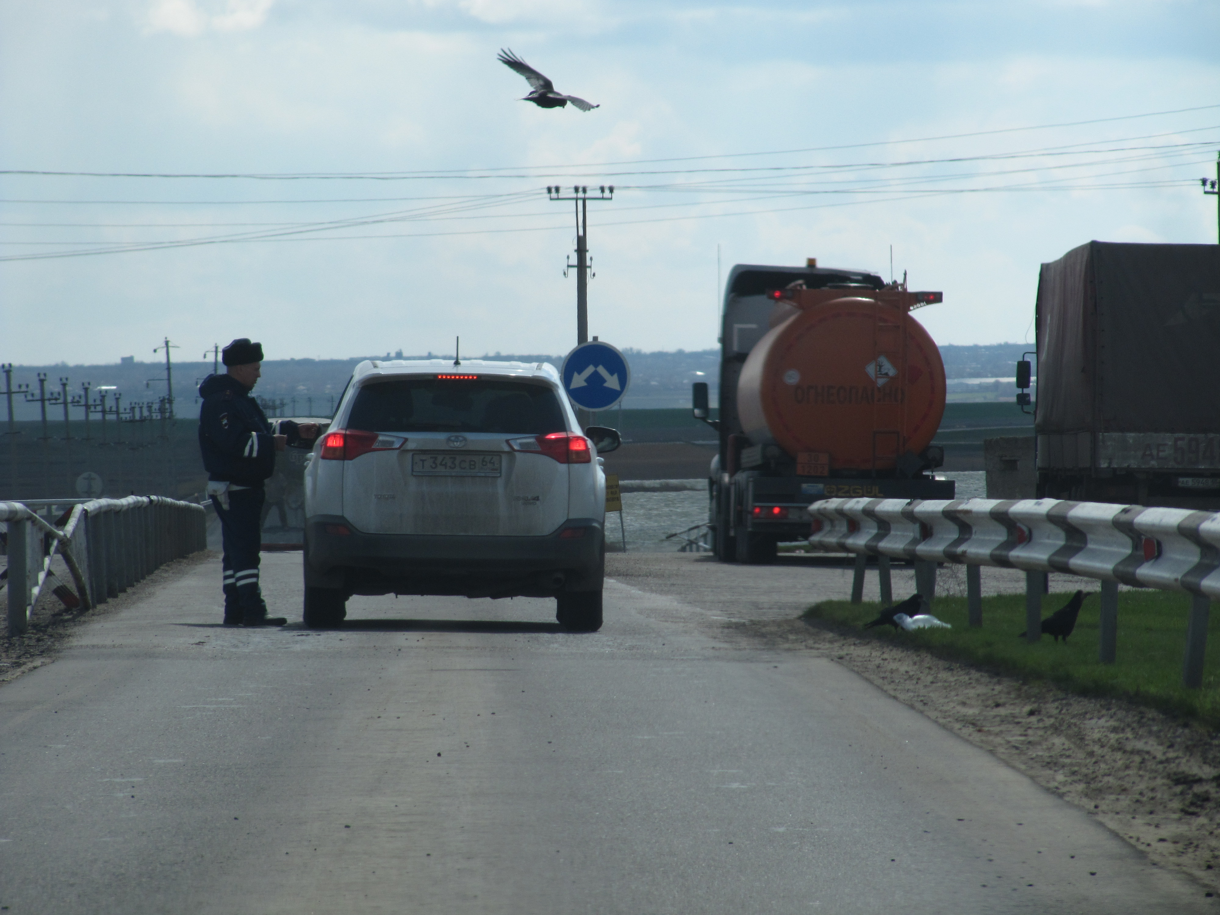 Пост ГБДД на административной границе Приютненского района Республики Калмыкия и Ставропольского края. около Видного, Ставропольский край